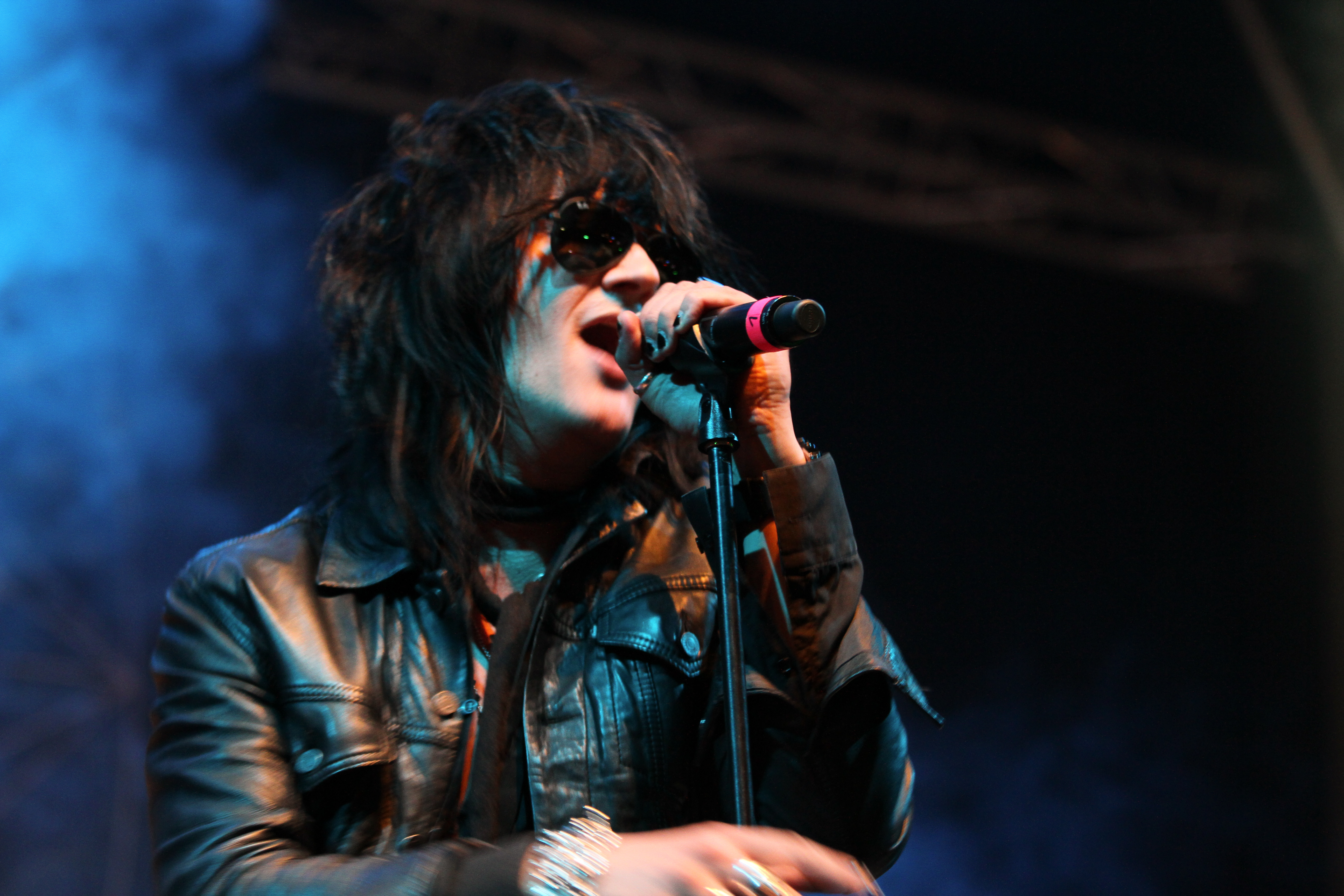 The 69 Eyes auf dem Wave-Gotik-Treffen 2013 in der Agra-Halle.